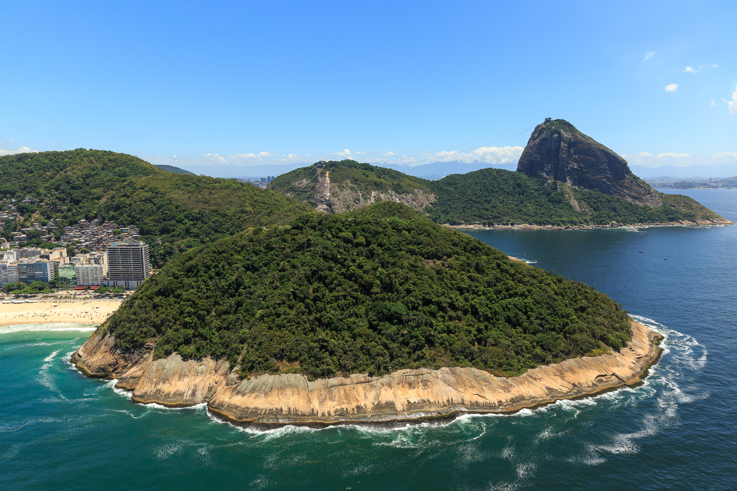 Vista aérea da Pedra do Leme, localizada na cidade do Rio de Janeiro.